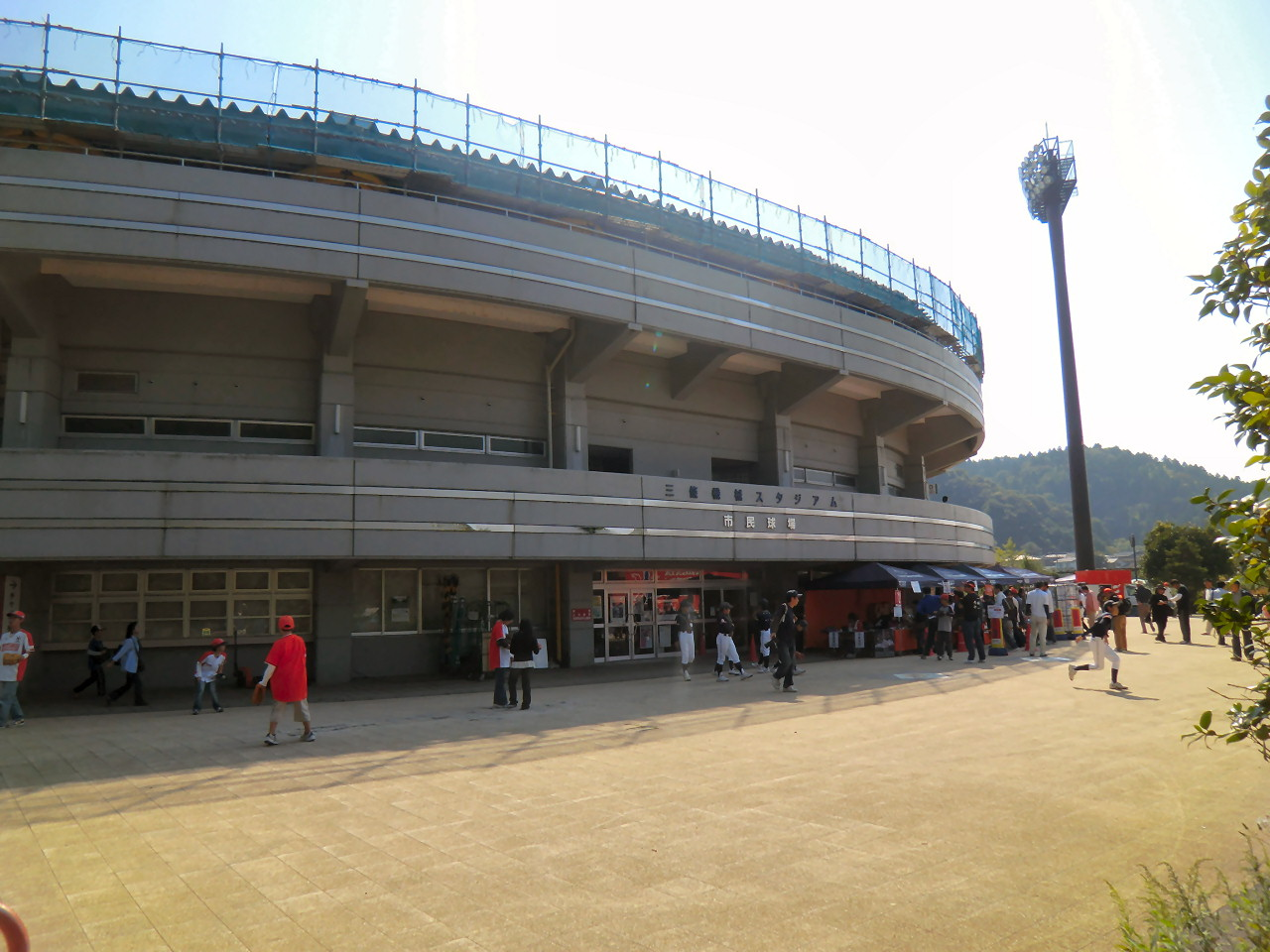 三條機械スタジアム 正面入口